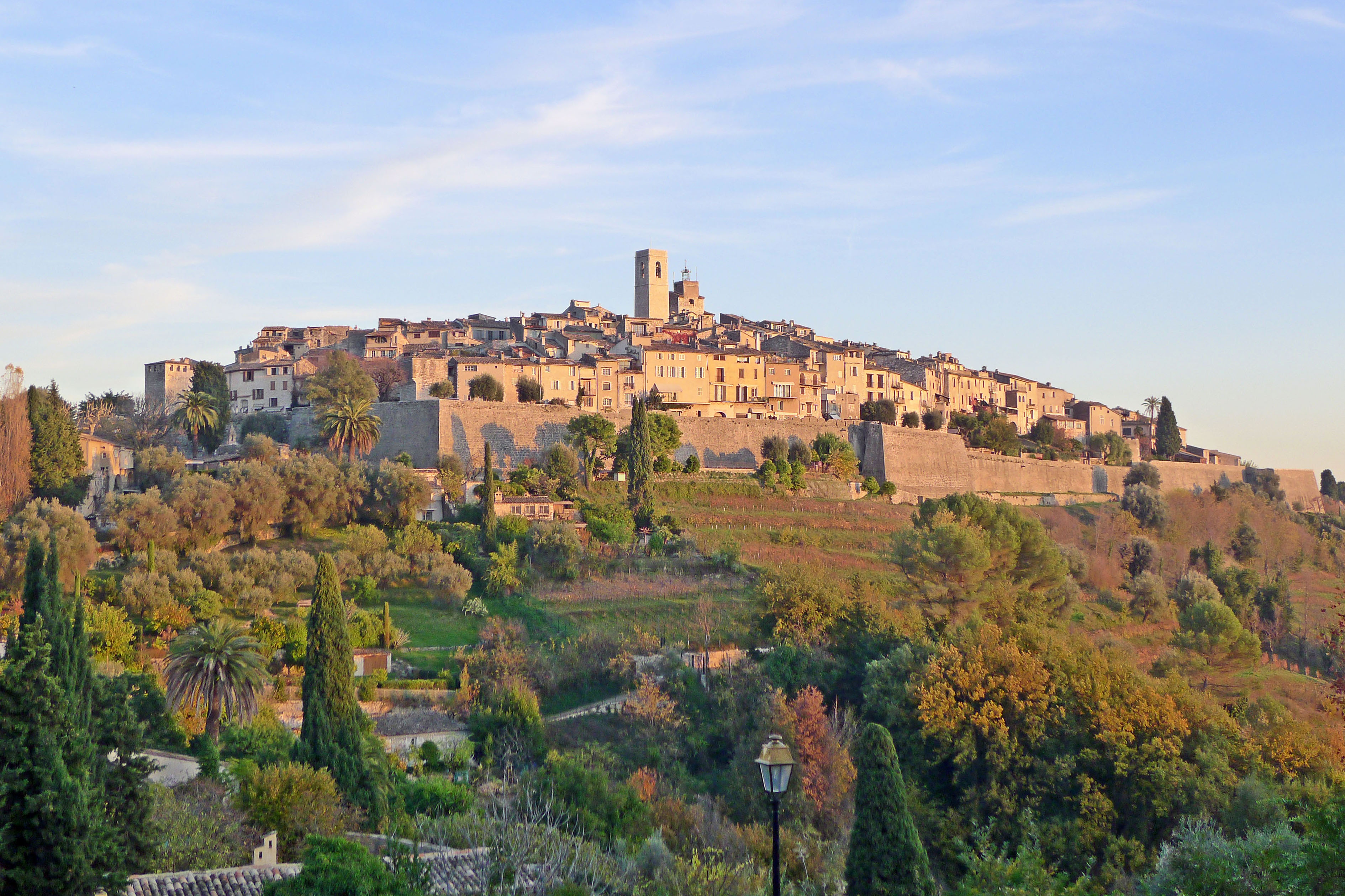 Vue du village de Saint-Paul-de-Vence depuis la route de La Colle.